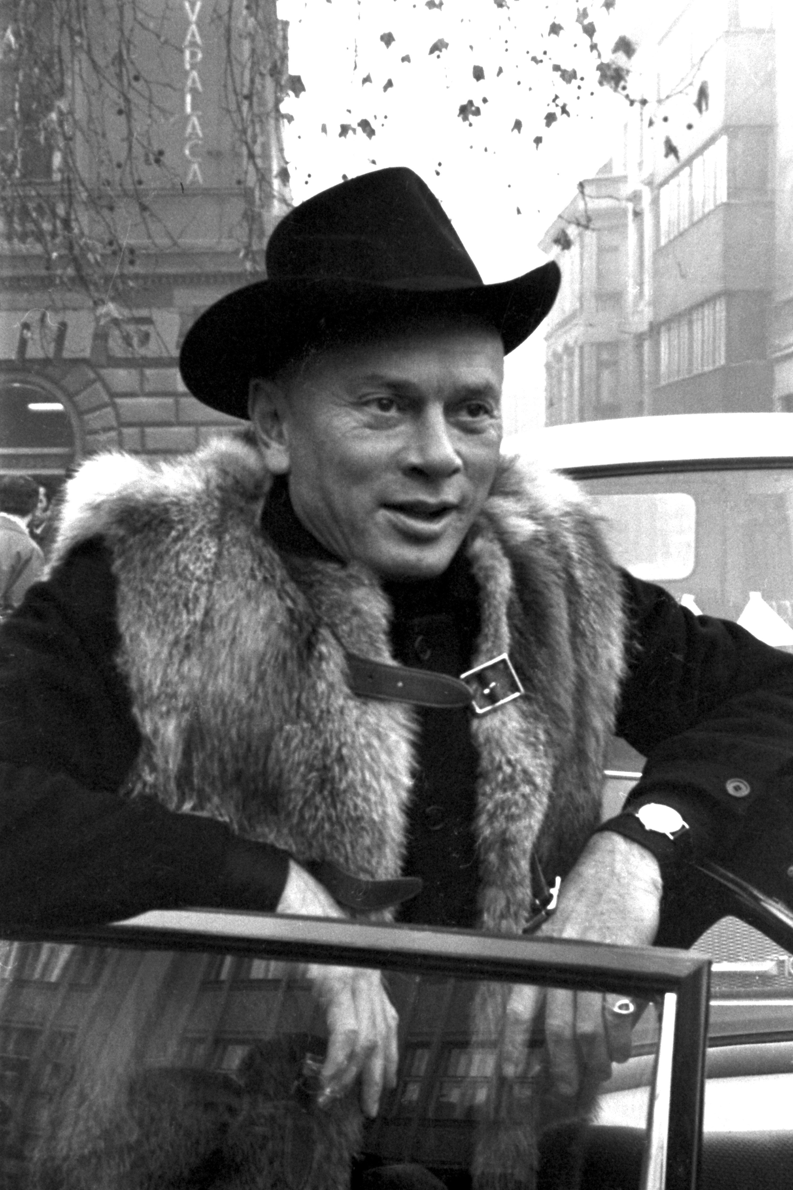 Jul Briner u Sarajevu, 1969. Autor fotografije Stevan Kragujević (po odobrenju Tanje Kragujević)